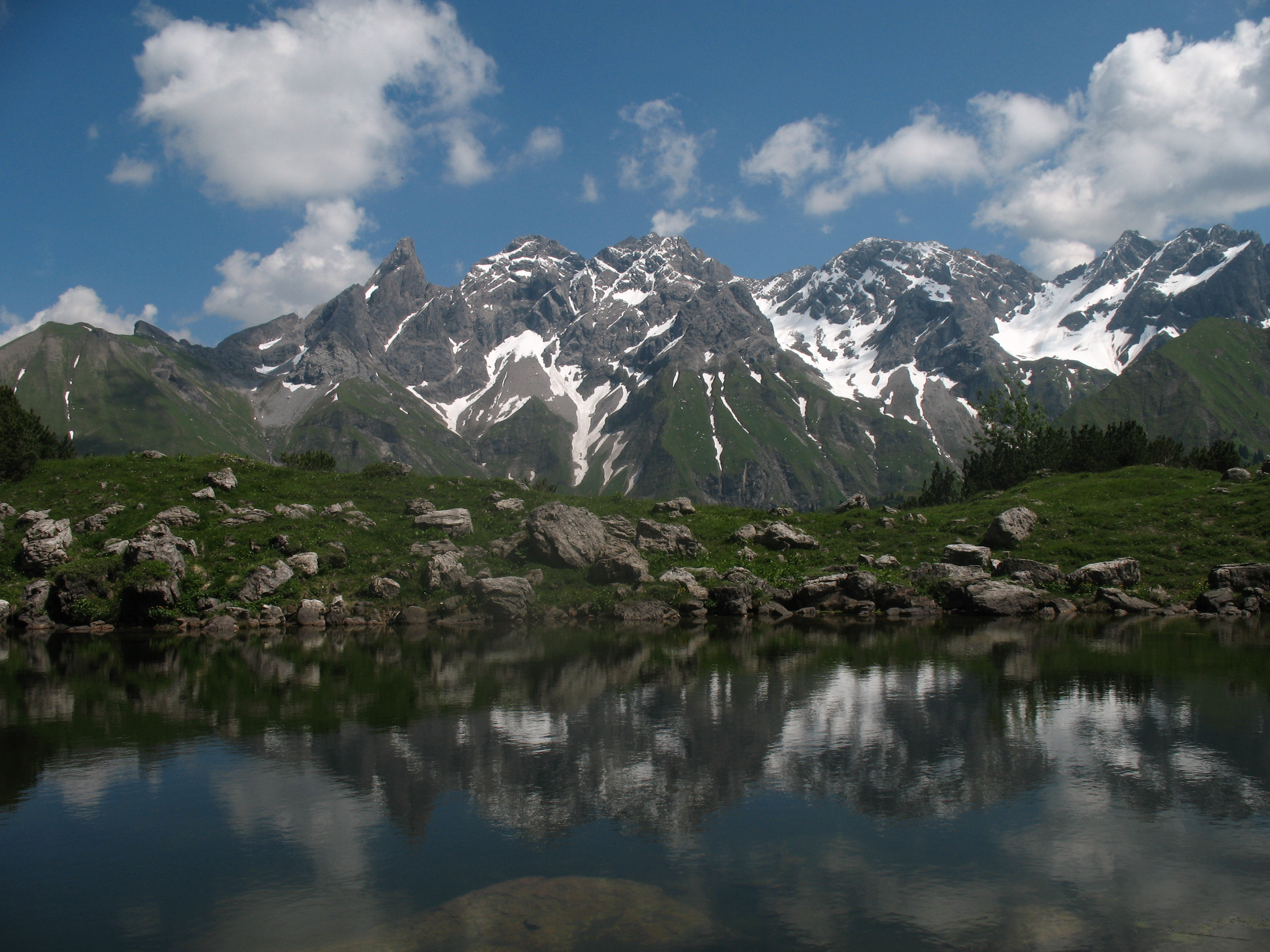 Blick über den Guggersee nach auf Trettachspitze (2595 m), Mädelegabel (2645 m), Hochfrottspitze (2649 m), Bockkarkopf (2609 m) und Steinschartenkopf (2615 m).